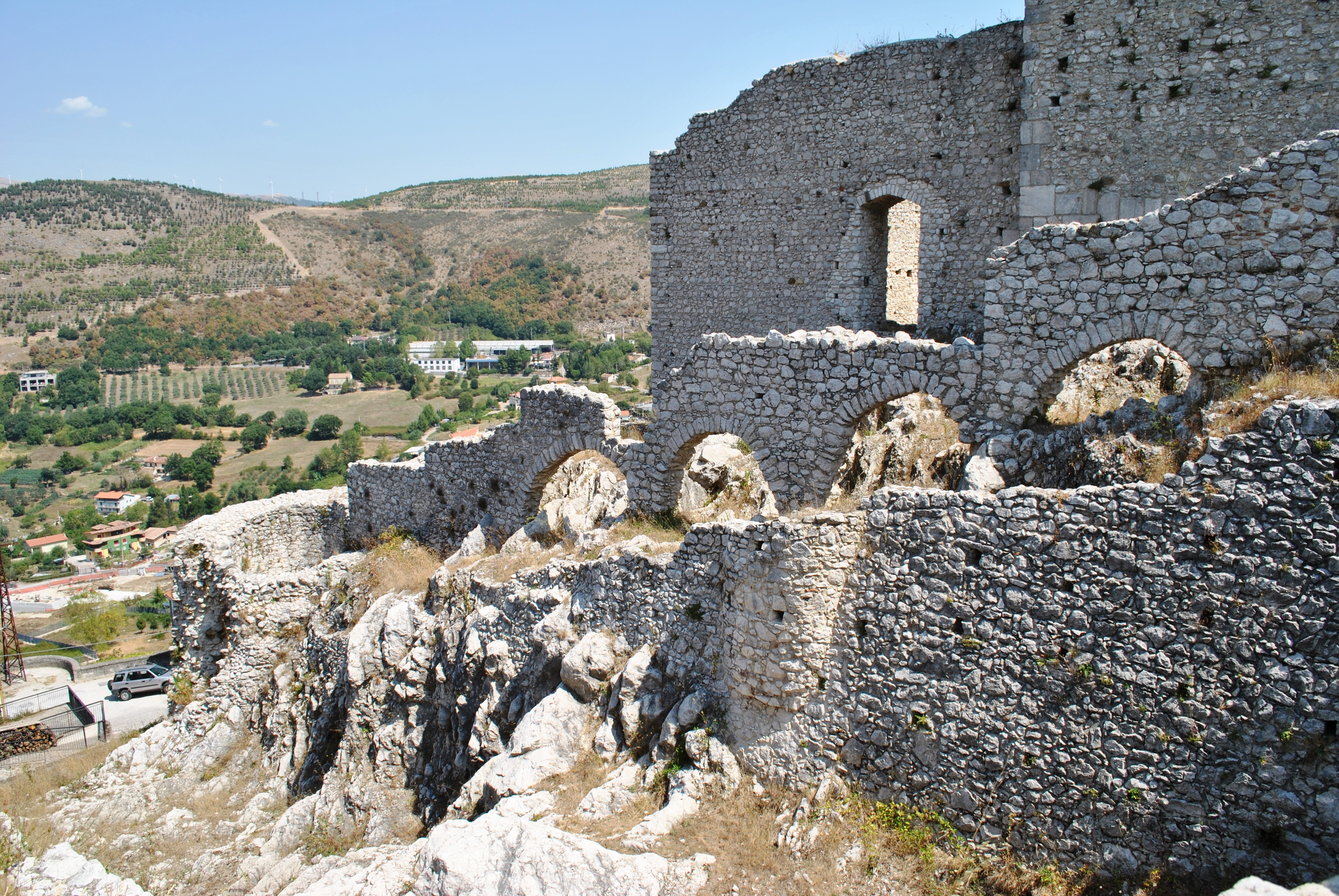 Parco archeologico urbano dell'antica Volcei - MIBAC This is a photo of a monument which is part of cultural heritage of Italy.